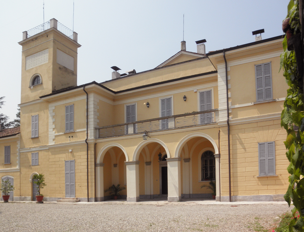 Villa Cavezzali Gabba a Tormo, frazione di Crespiatica; la facciata verso il cortile.